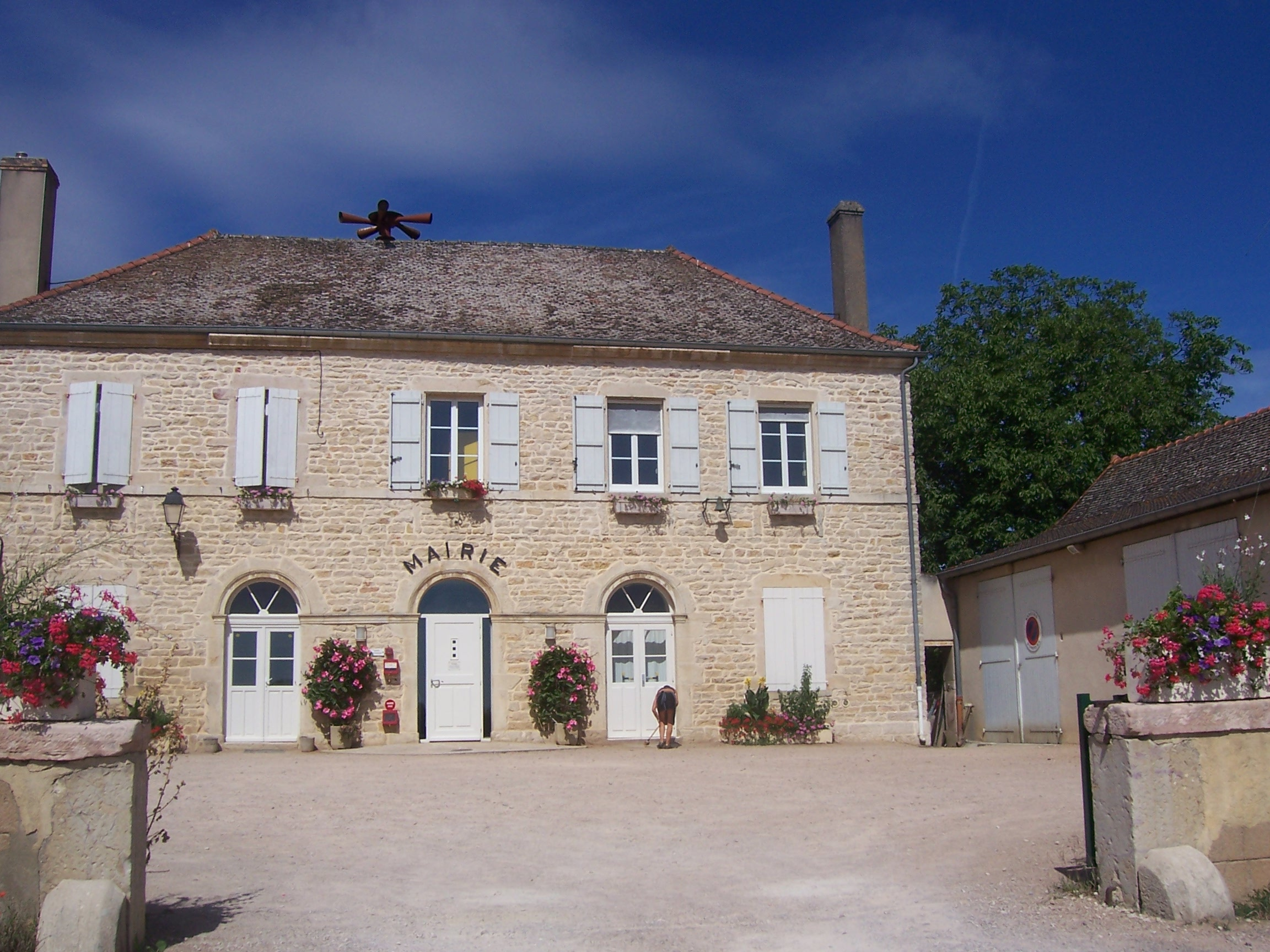 Mairie de Gigny-sur-Saône